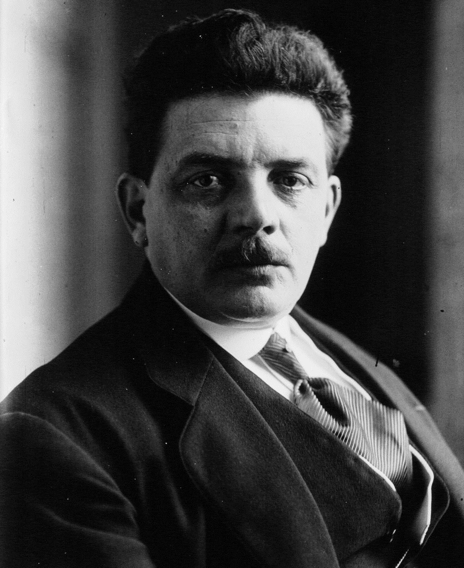 Édouard Herriot, sénateur, maire de Lyon. Photographie de presse, négatif sur verre ; 13 x 18 cm (sup.) ou moins.